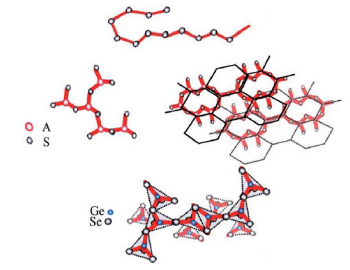 chalcogenide glass structure